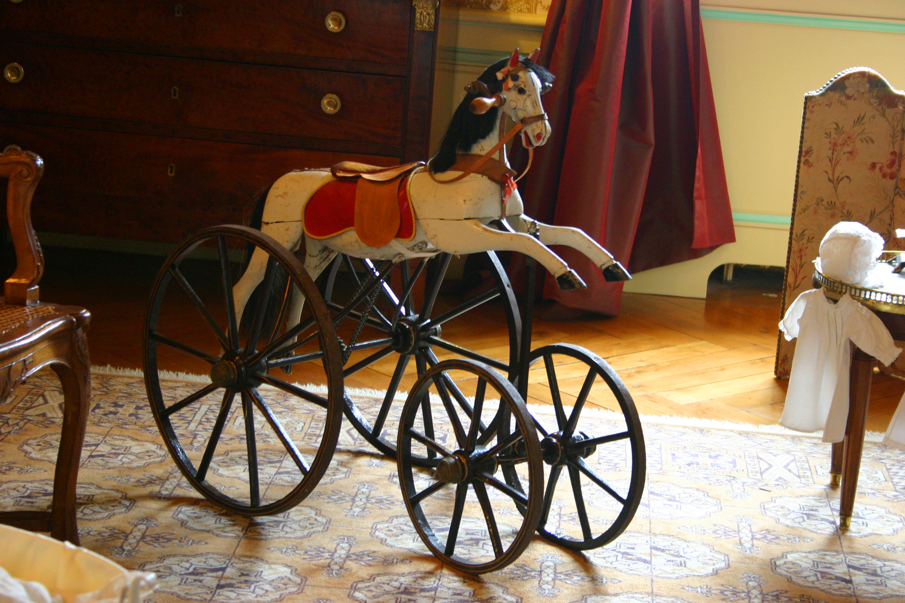 Premier modèle de cheval de bois de l'époque Napoléon III, dans les Appartements Privés du Château de Cheverny